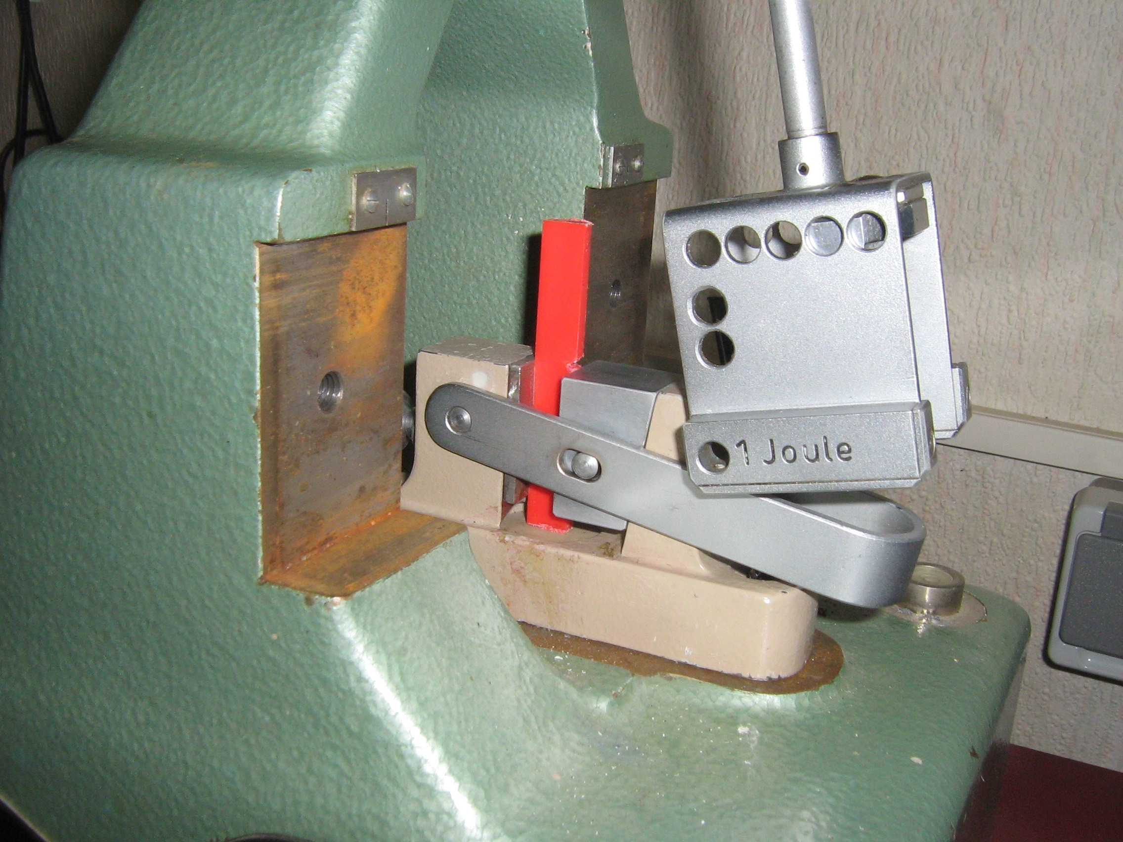 Probenhalterung und Schlagpendel für IZOD-Kerbschlagprüfung